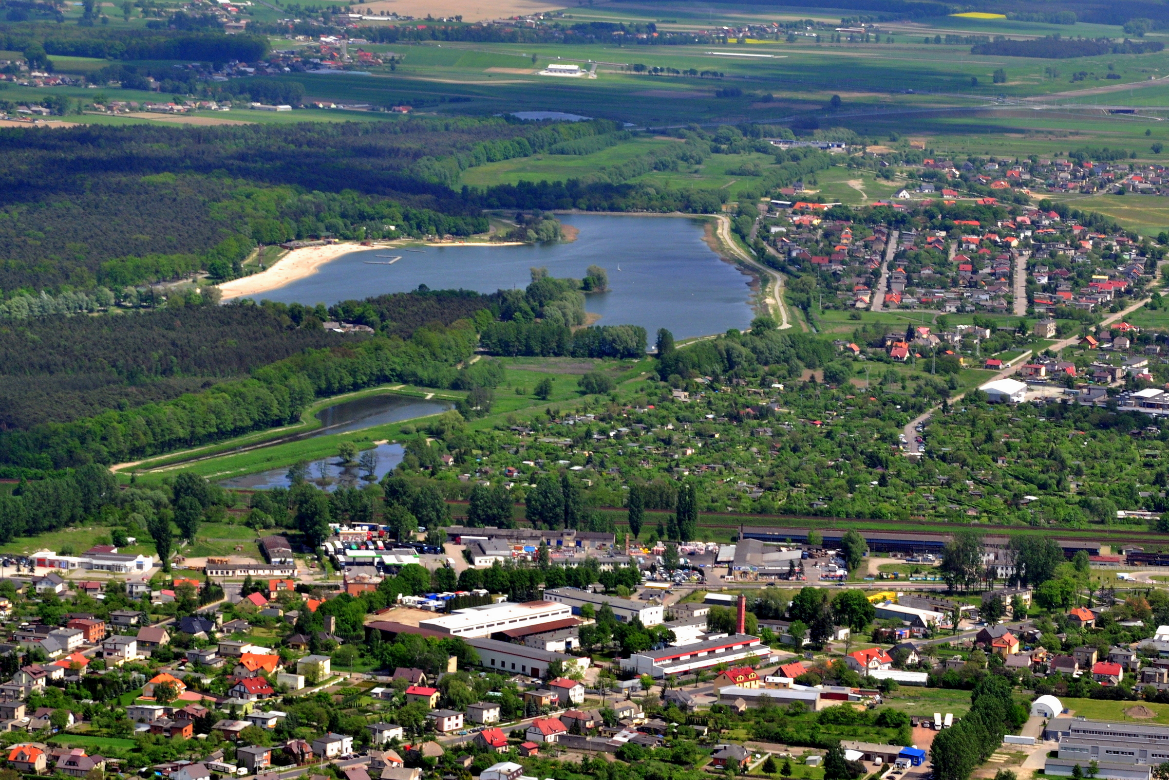 Ostrów Wlkp. Zbiornik wodny Piaski - Szczygliczka, miejsce rekreacji i wypoczynku ostrowian.